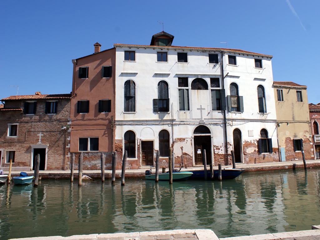 Ex chiesa e monastero dei SS.Teresa e Giuseppe in Murano (Venezia) - Monache Carmelitane scalze (1736)